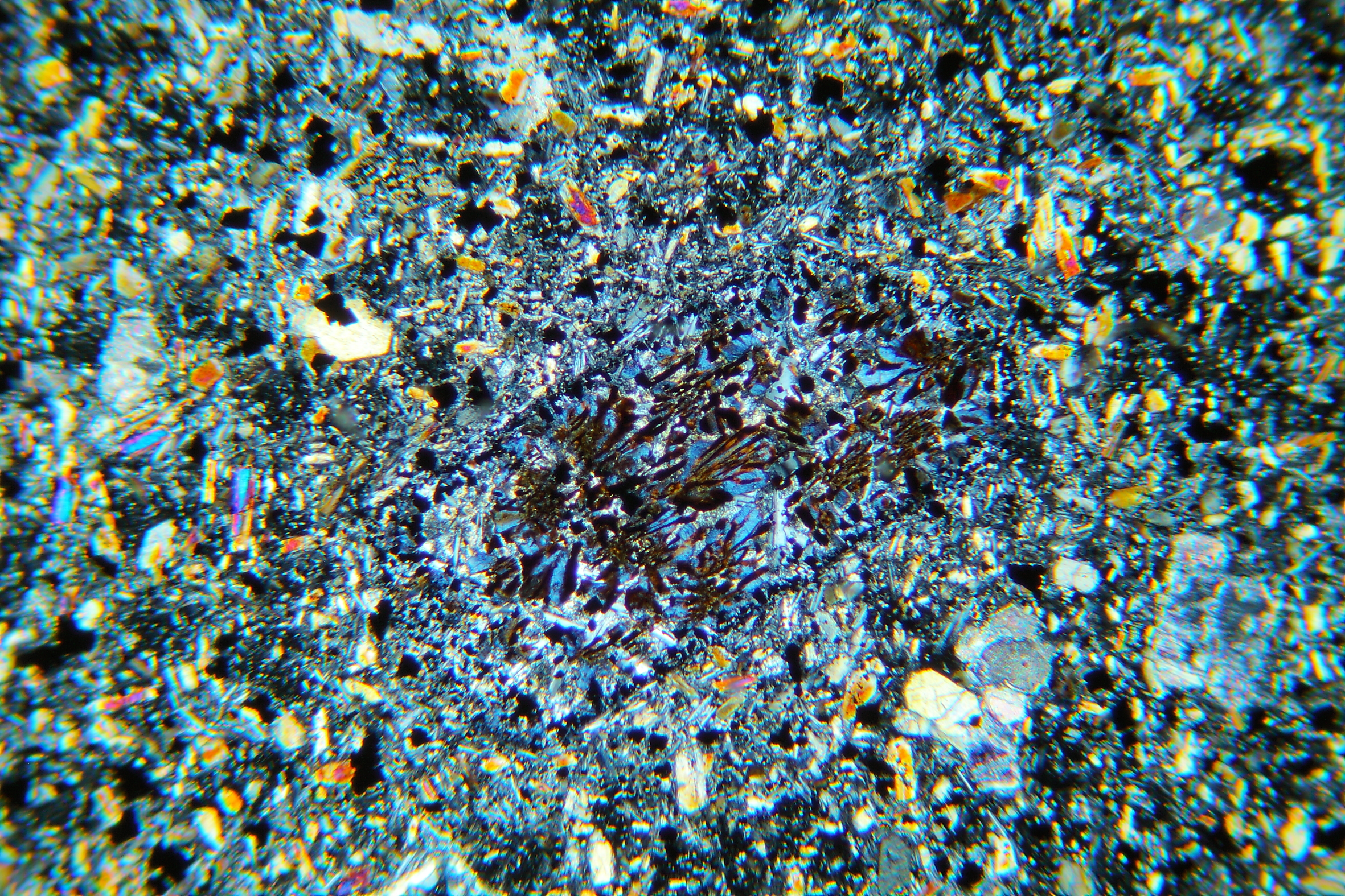 Vollständig opacitisierter Hornblendekristall, XPL.